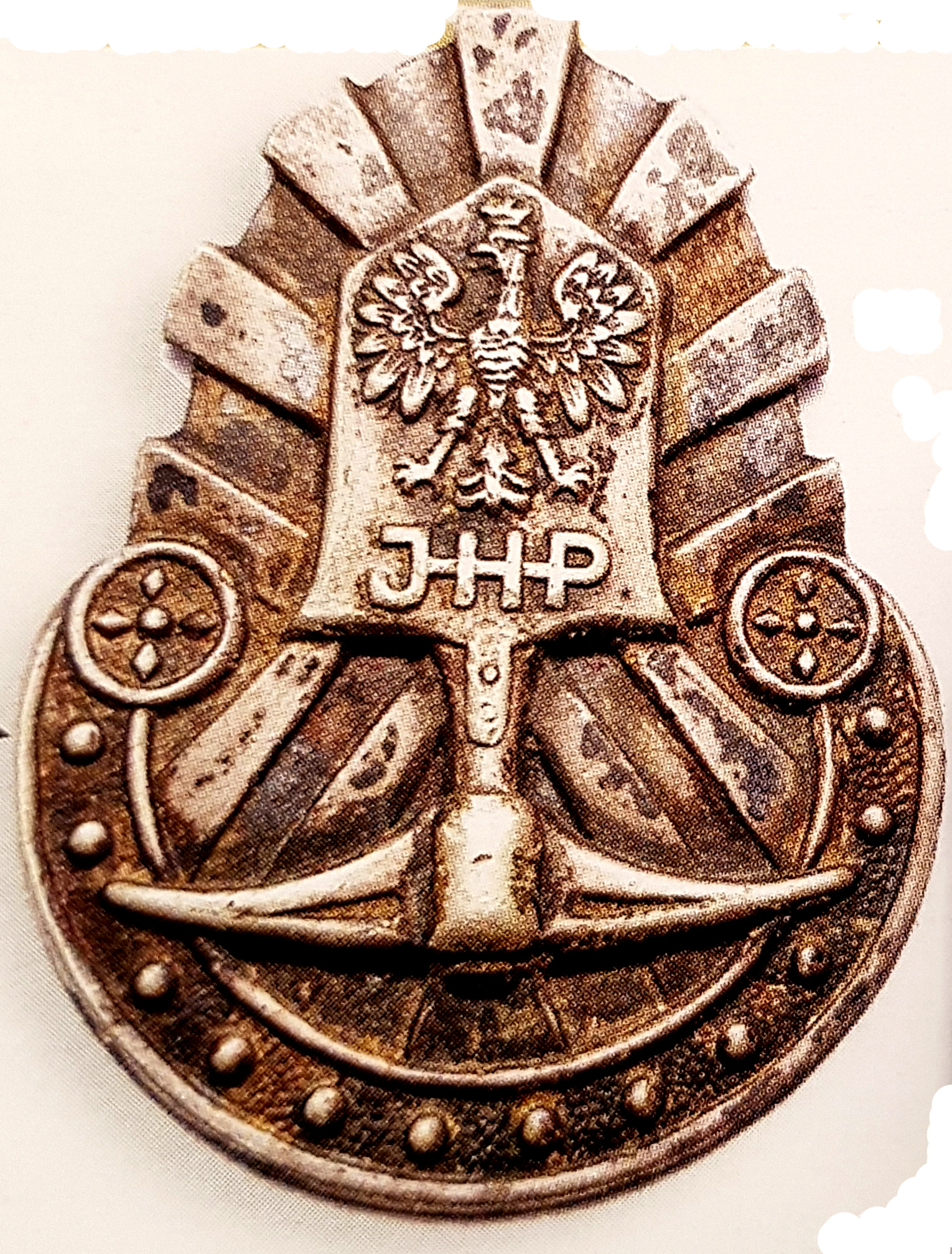 Odznak JHP